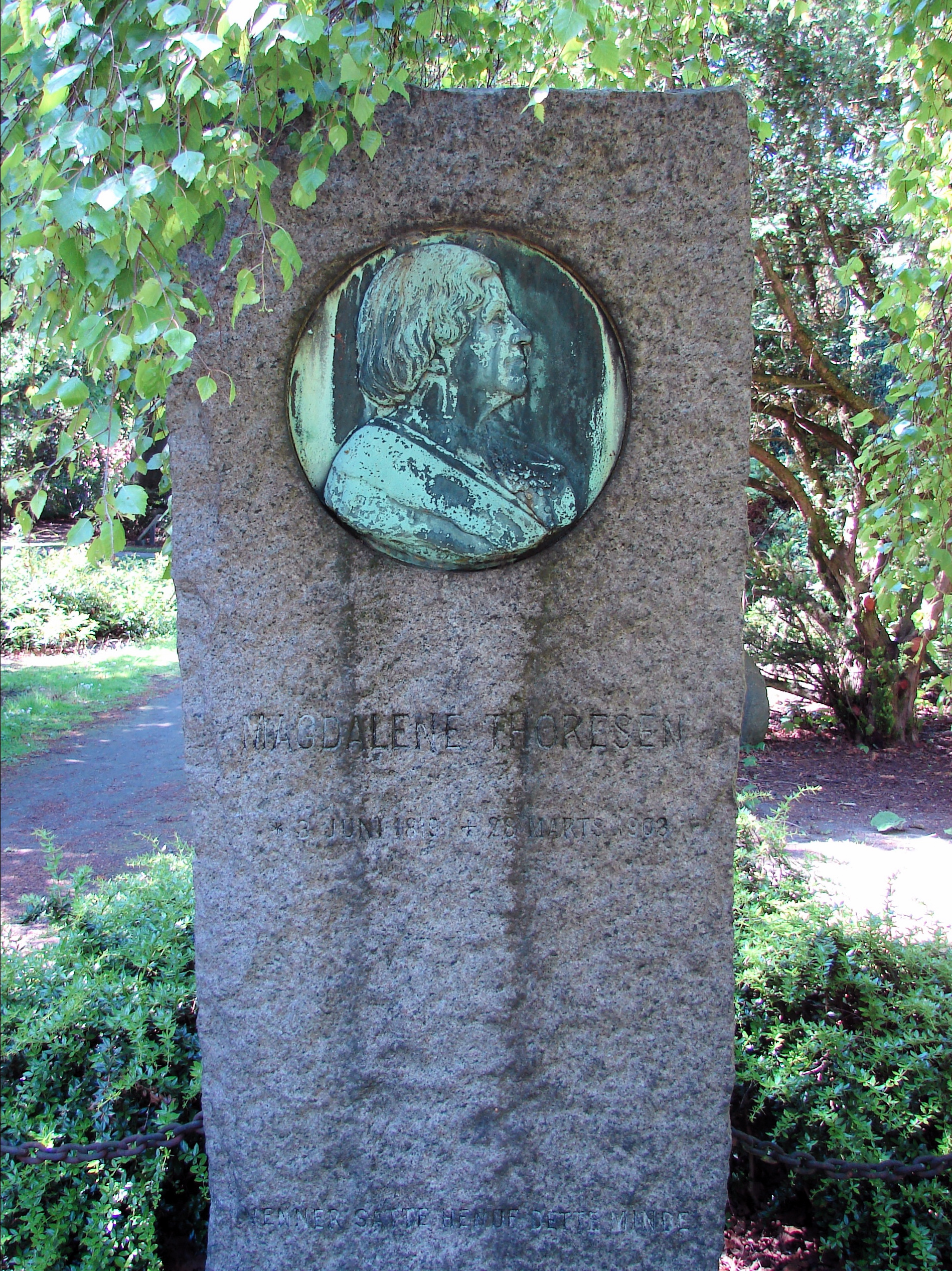 Magdalene Thoresen (1819-1903) forfatterinde, Henrik Ibsens svigermoder, gravsten på Assistens kirkegård, København